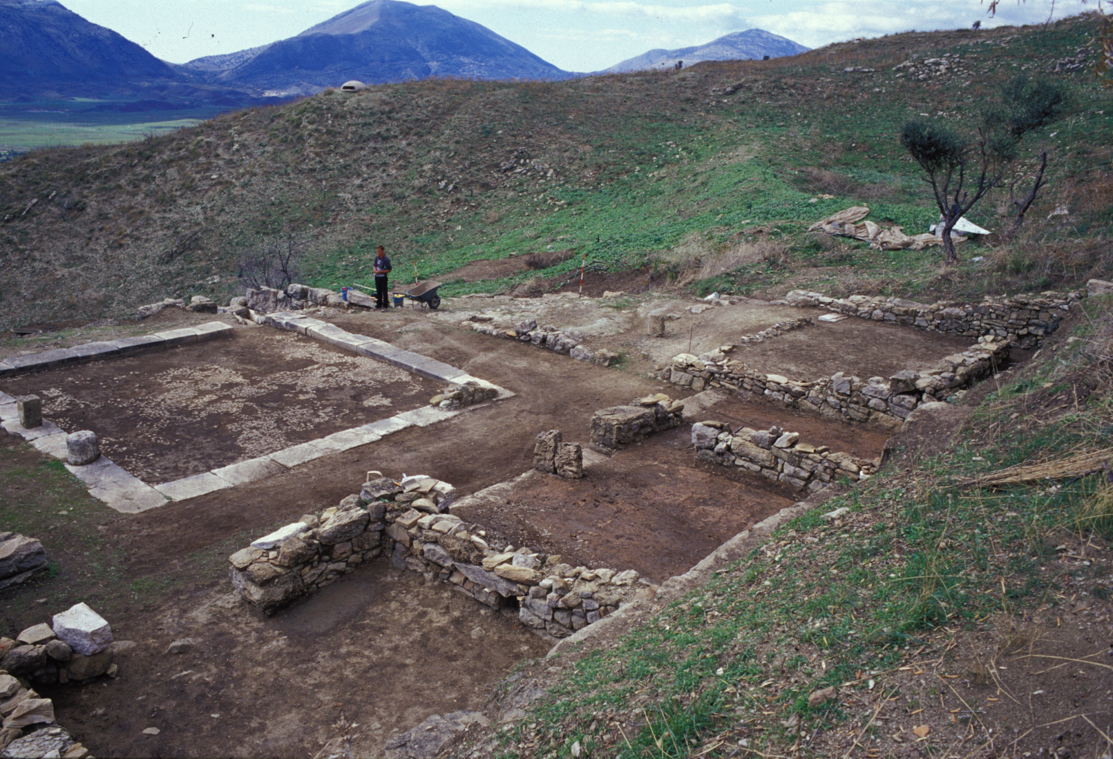 veduta del peristilio maggiore della Casa dei due peristili di Phoinike (Albania)